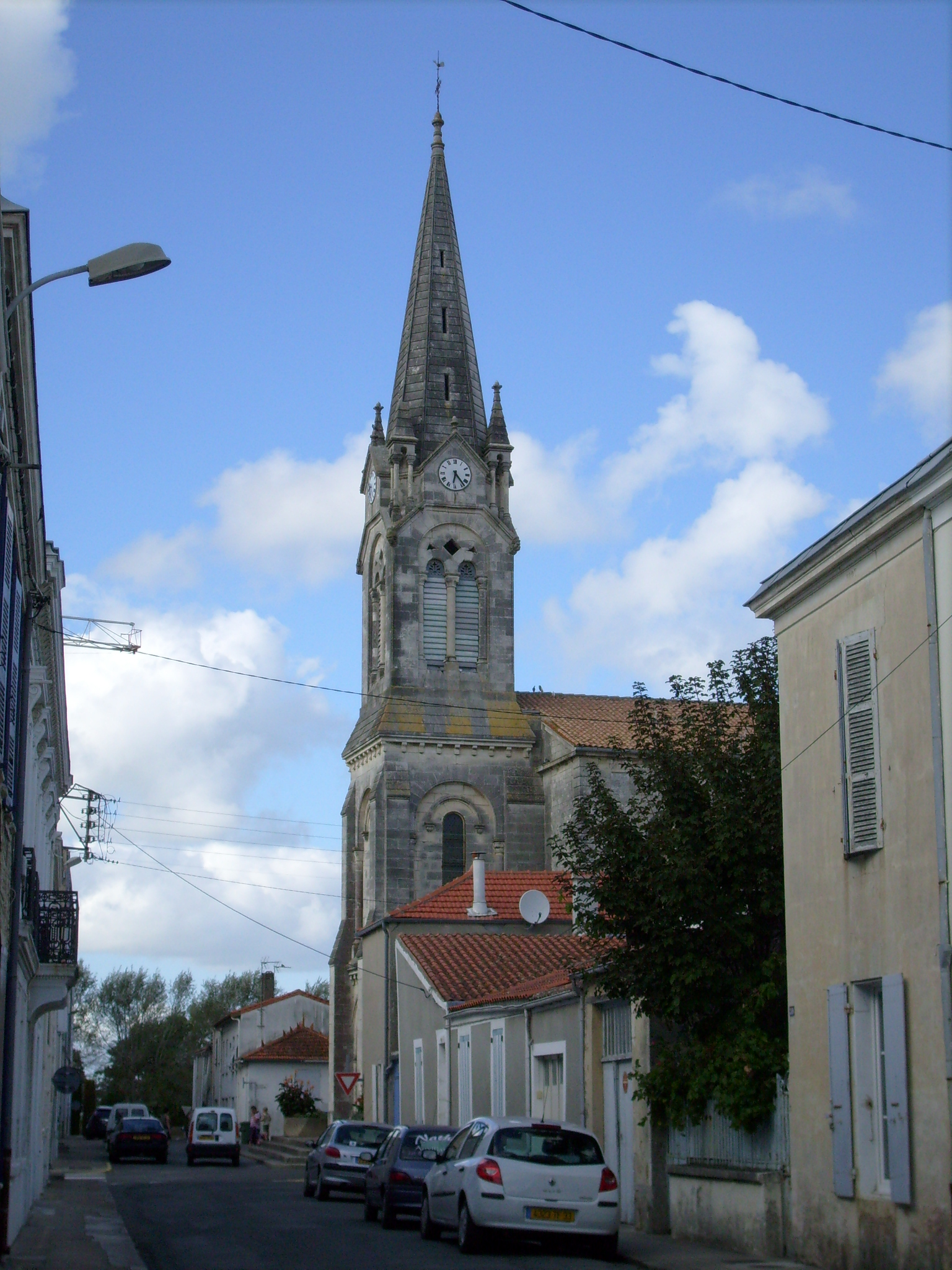 L'église du Château d'Oléron